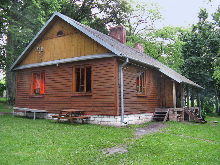 Wiejska chata, w której odbywają się gardzienickie zgromadzenia